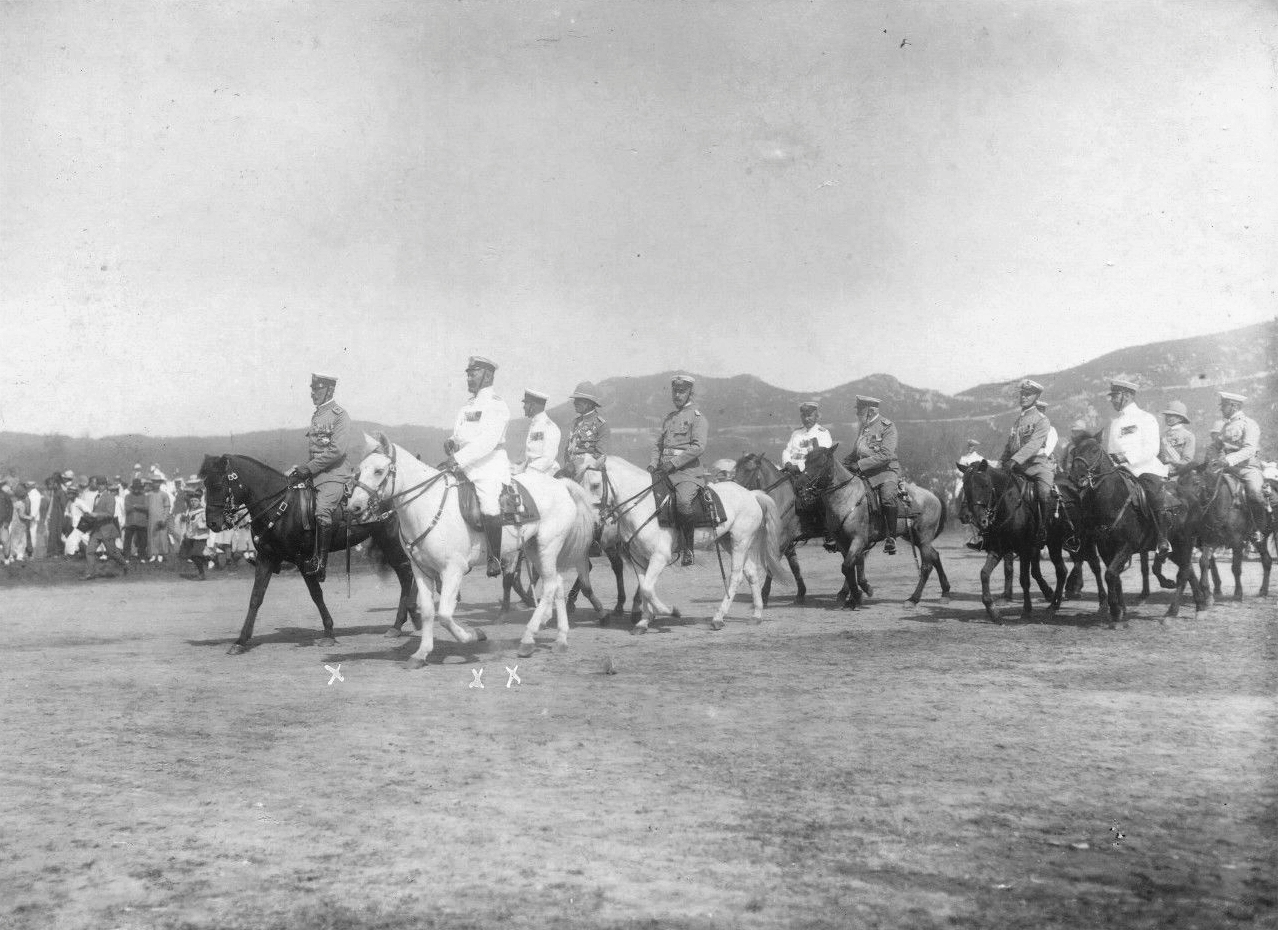 海因里希亲王与总督麦维德在青岛跑马场